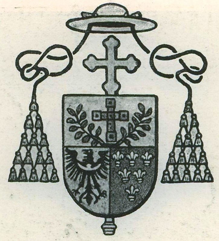 Wappen des Breslauer Bischofs Adolf Kardinal Bertram bis 1930